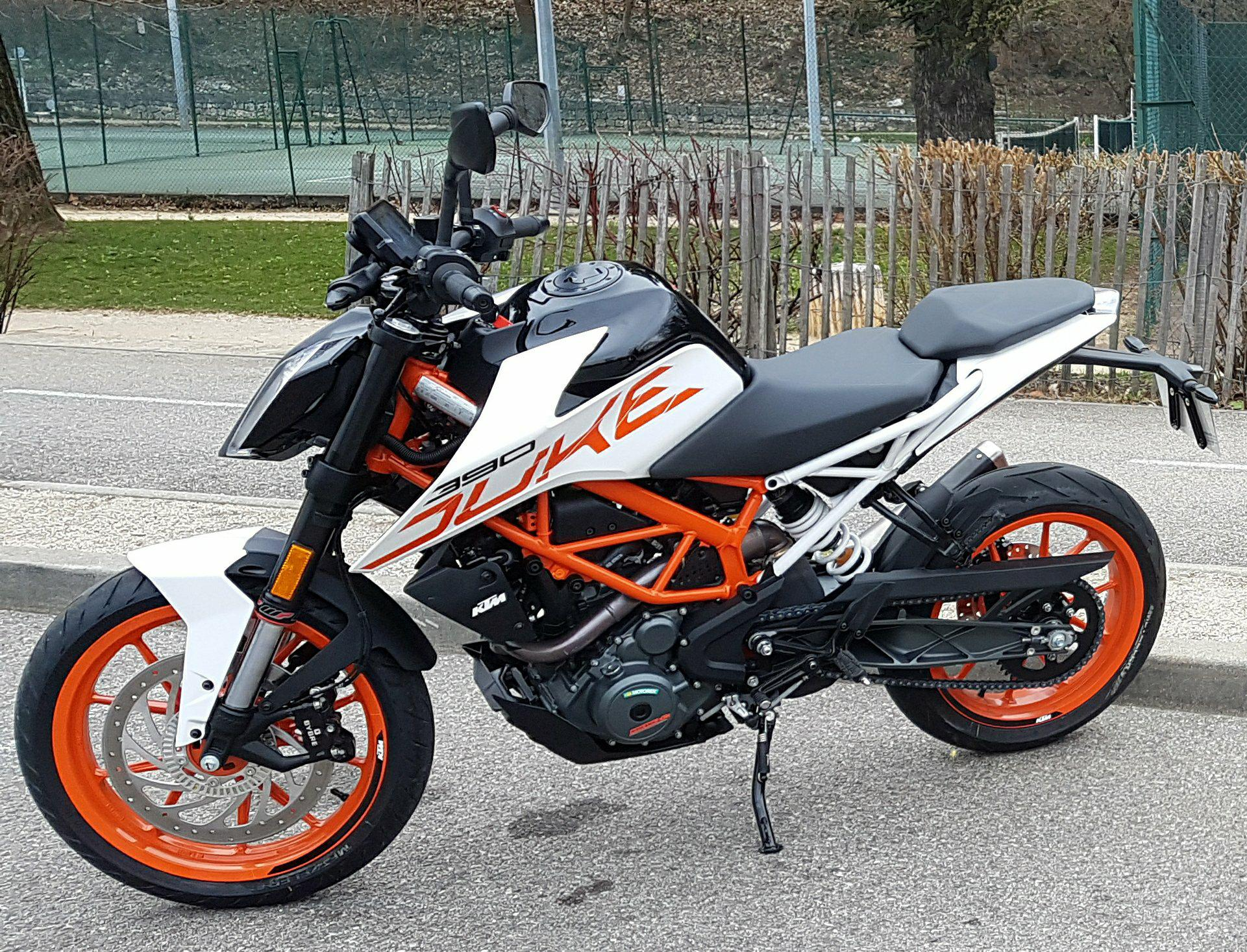 KTM Duke 390 2018